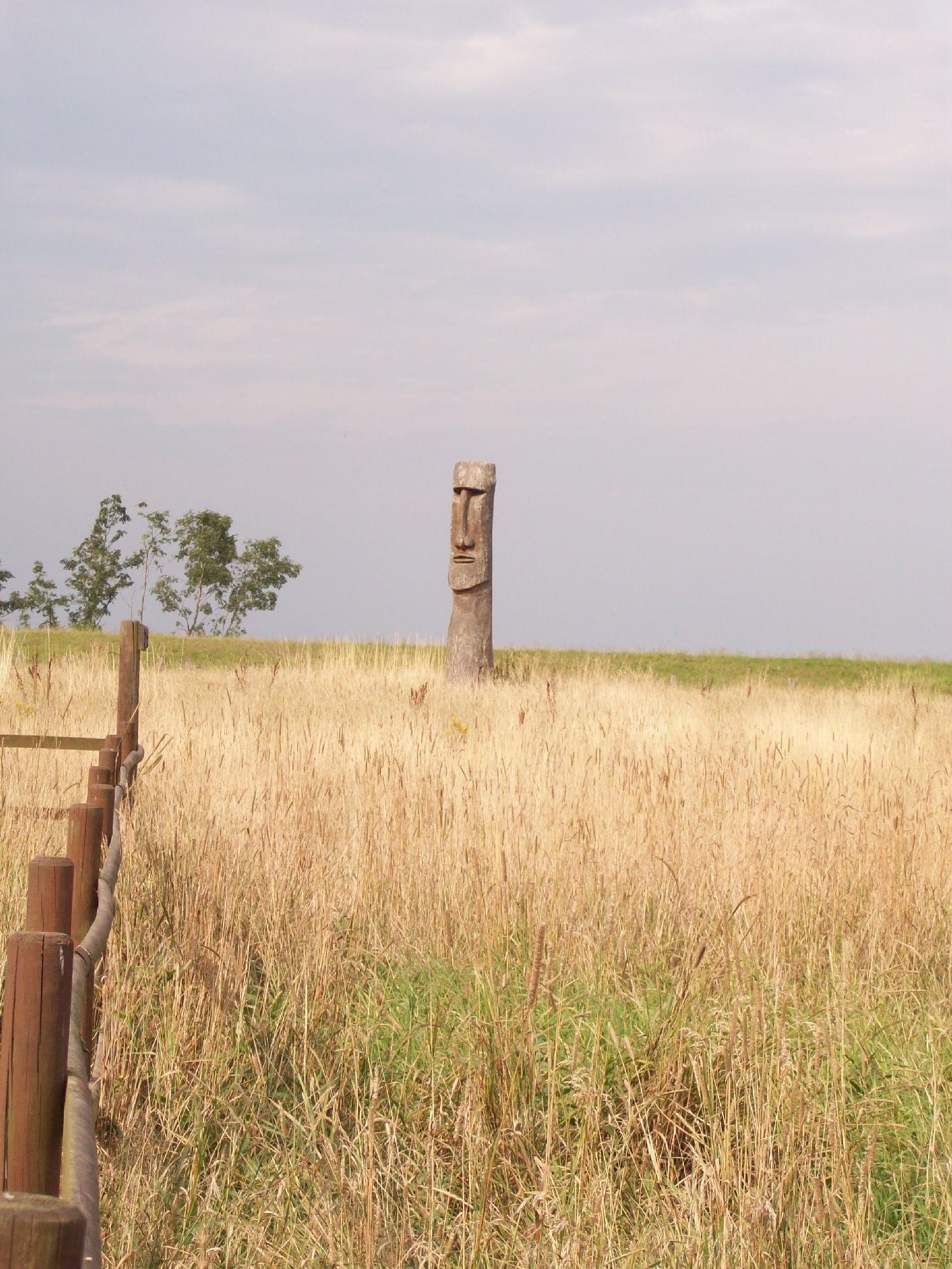 „Osterinselstatue“ am neuen Schutzdeich in Falshöft, Gemeinde Nieby, Schleswig-Holstein.